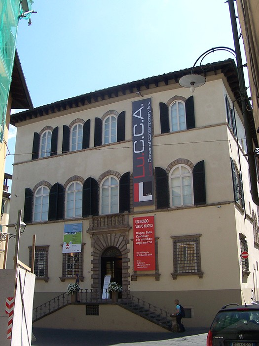 Lucca - Center of Contemporary Art